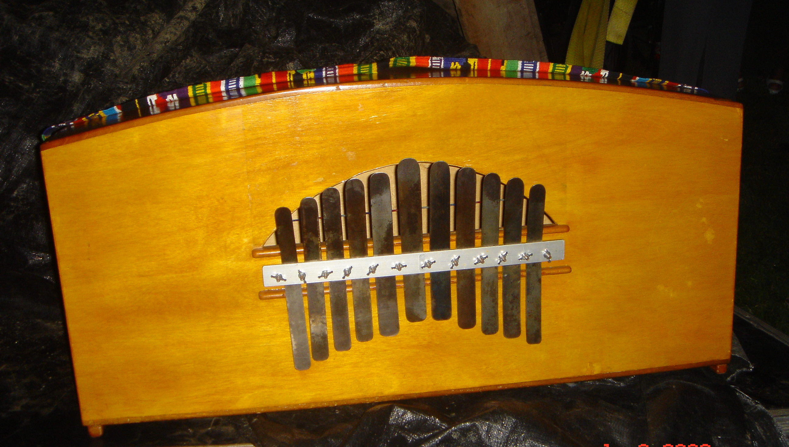 Marimbol Jarocho de 11 lenguetas